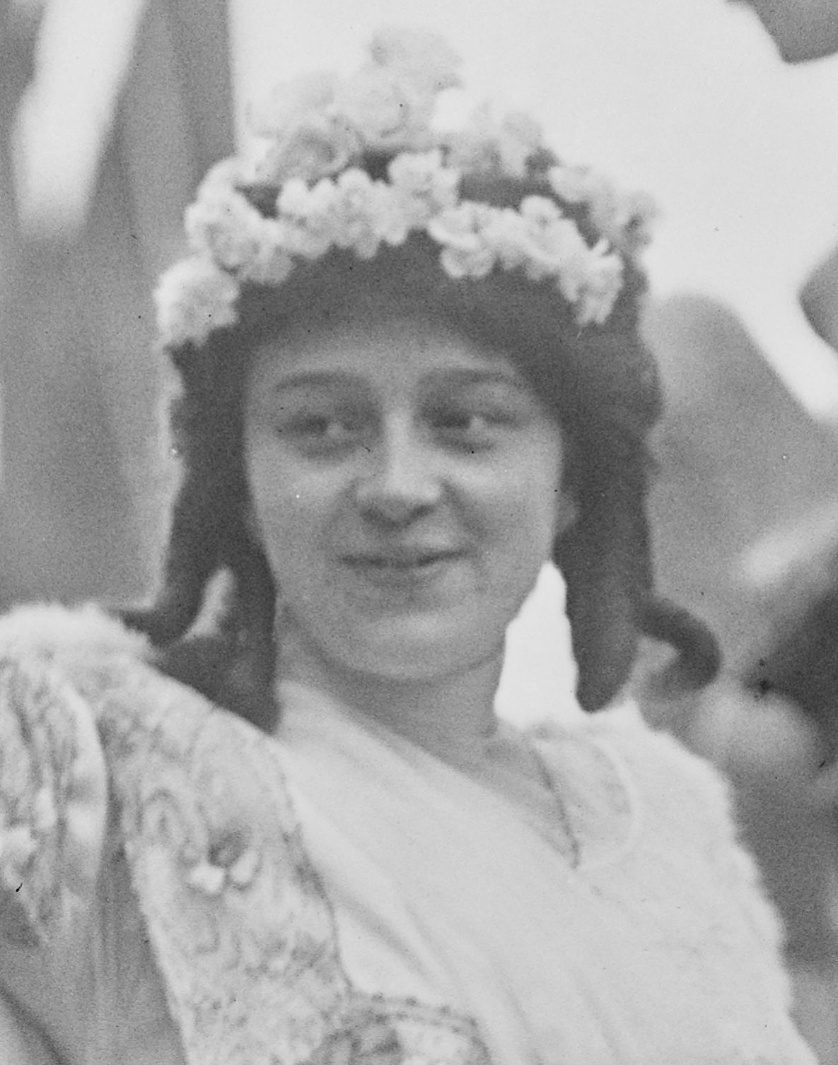 Portrait de la Rose des Roses de Paris le jour de la Mi-Carême 1912.